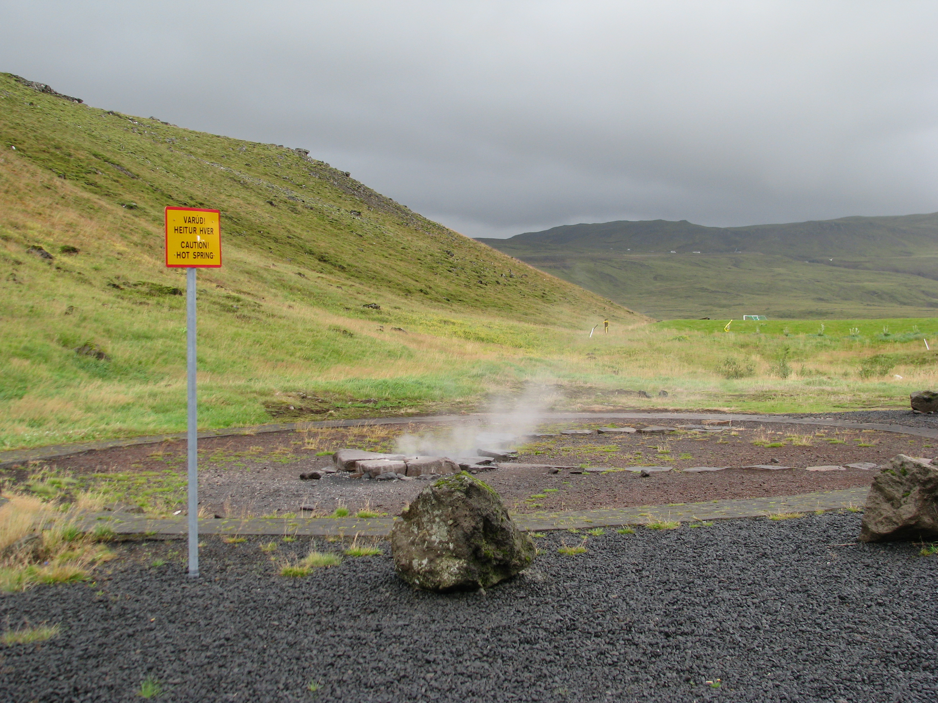 Grýla, geysir, Iceland